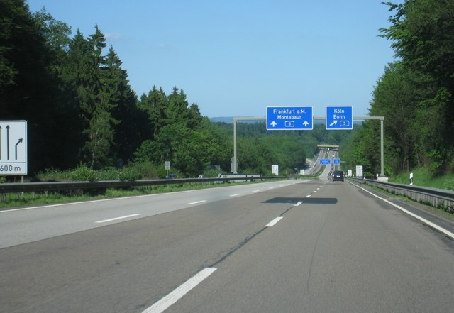 A48 bei Kreuz 13 (A3)